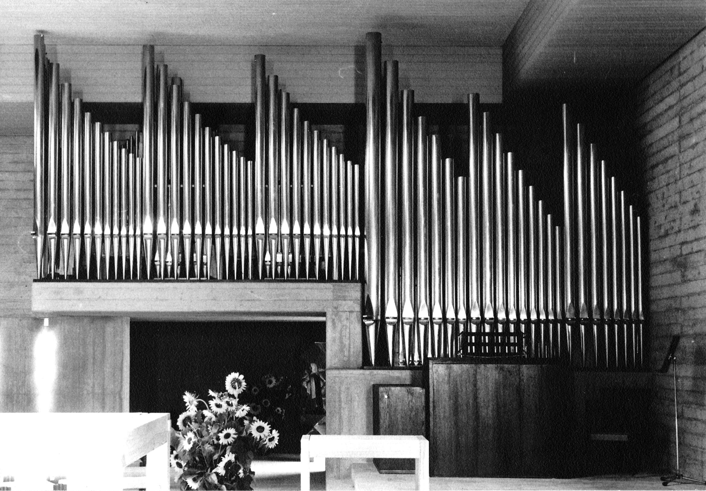 Römisch-katholische Pfarrei Heilig Geist Zürich-Höngg, Orgel in der Gestaltung von 1973